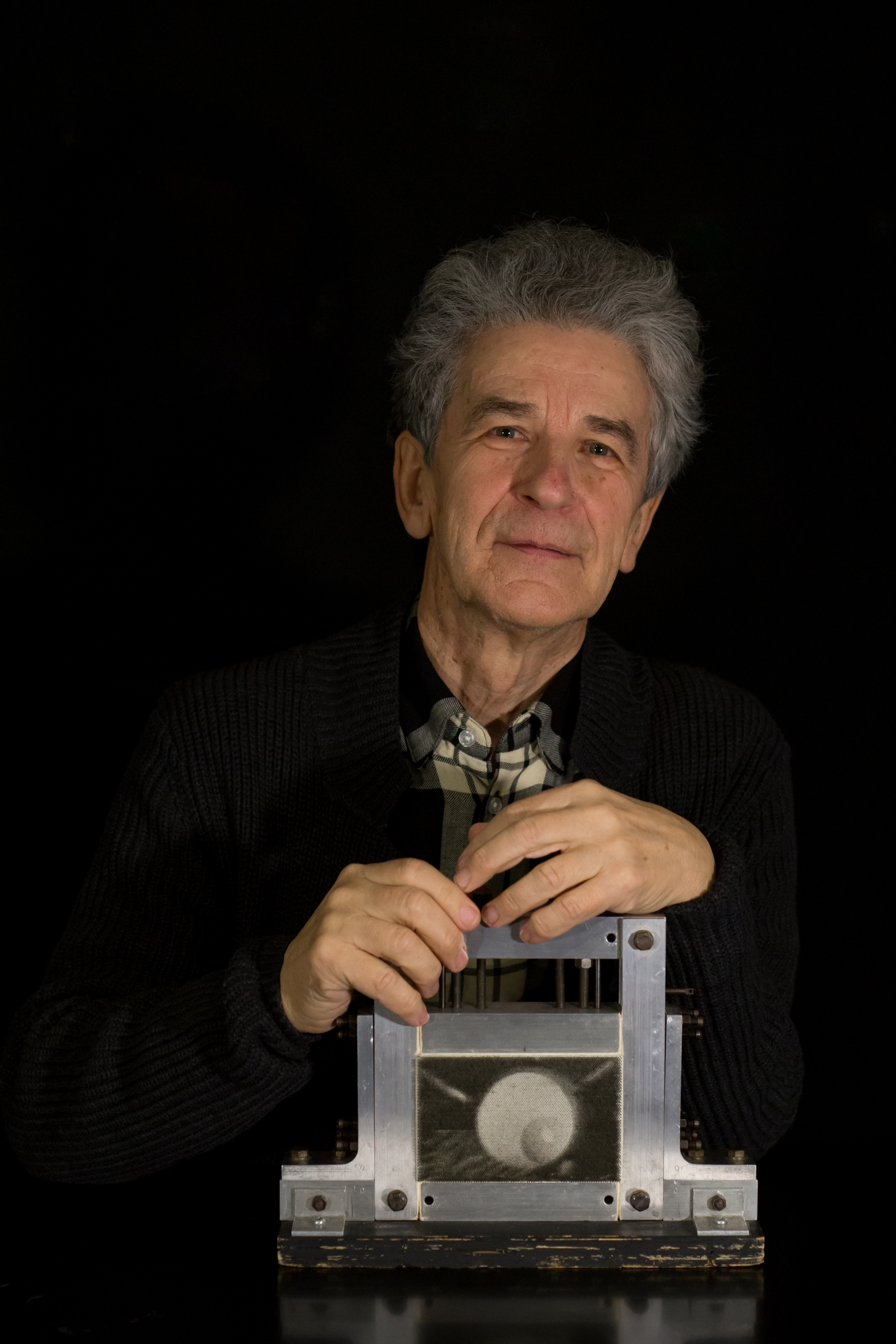 Portrait du réalisateur Jacques Drouin et d'un écran d'épingles Baby Screen.